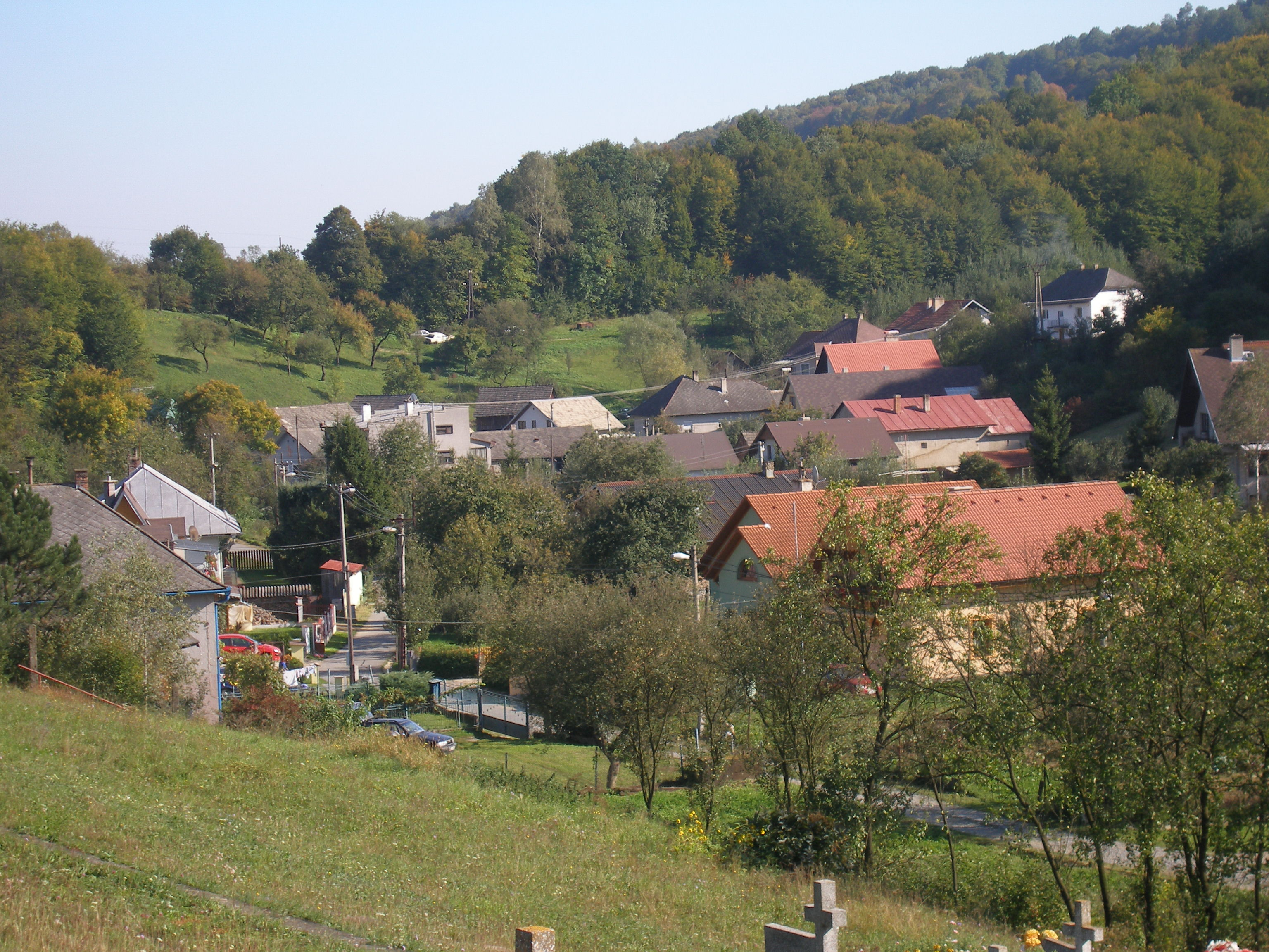 Obec Rokycany okres Prešov, región Šariš